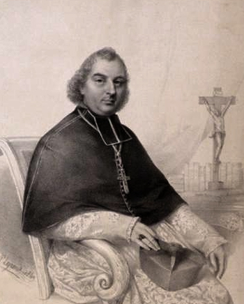 Paul-Armand Cardon de Garsignies, évêque de Soissons de 1847 à 1860. L'un des premiers évêques a avoir rencontré Bernadette Soubirous à Lourdes (le 20 juillet 1858), il entreprend ensuite des démarches auprès de Napoléon III, pour qu'il autorise l'ouverture de la grotte de Massabielle au public, alors interdite d'accès.